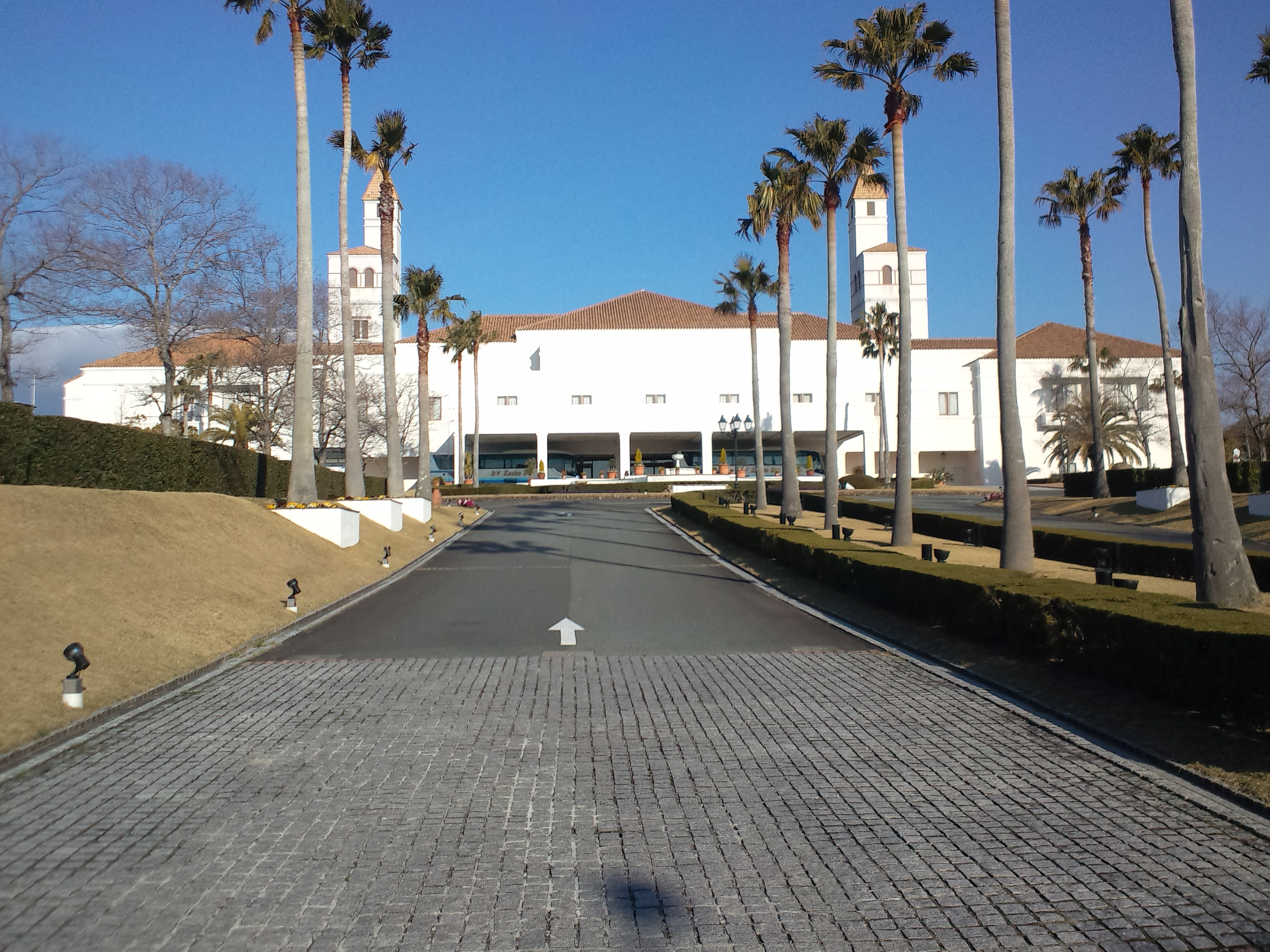 志摩スペイン村、パルケエスパーニャ ホテル「志摩スペイン村」